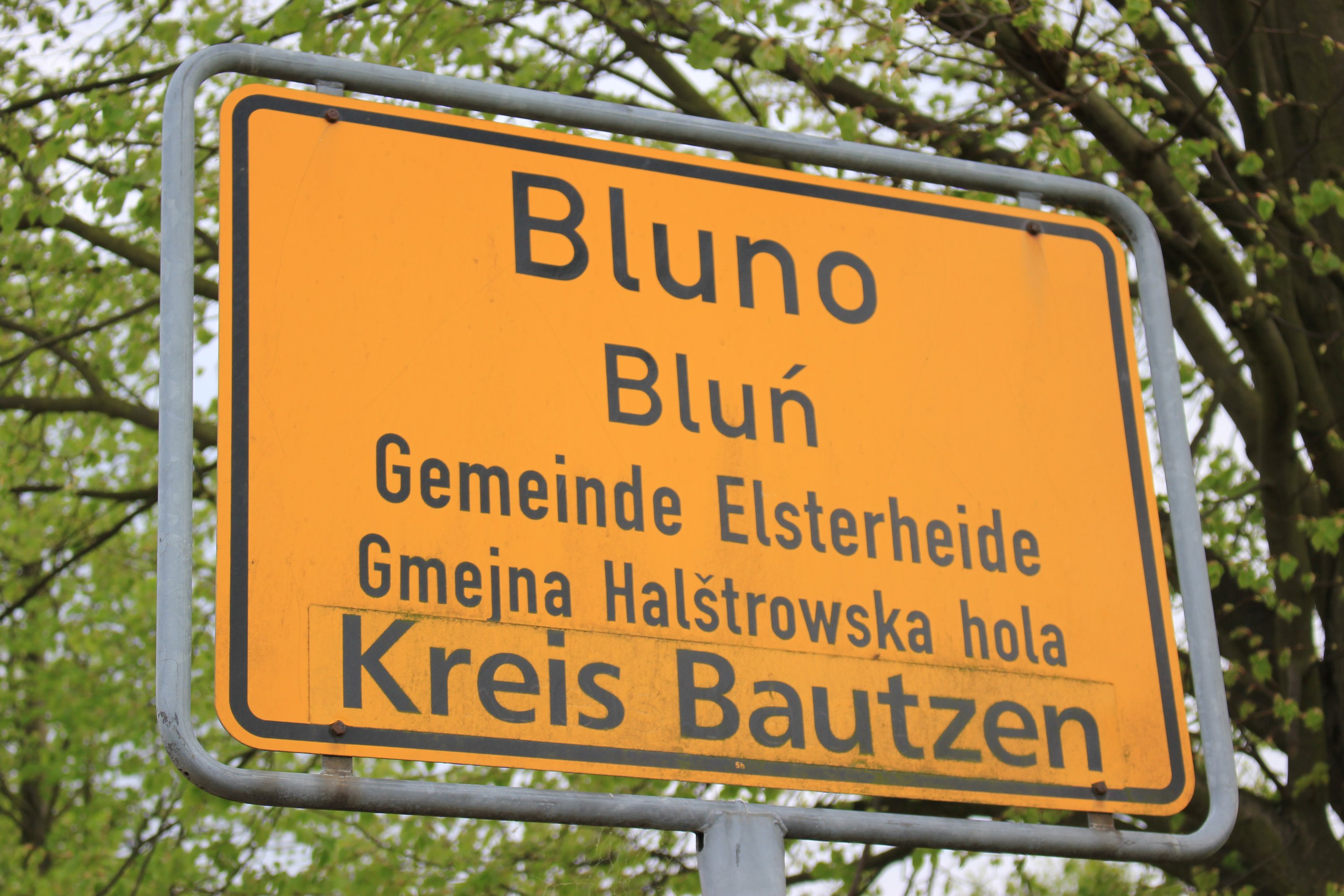 Hornjoserbsce: Wjesna tafla Blunja.